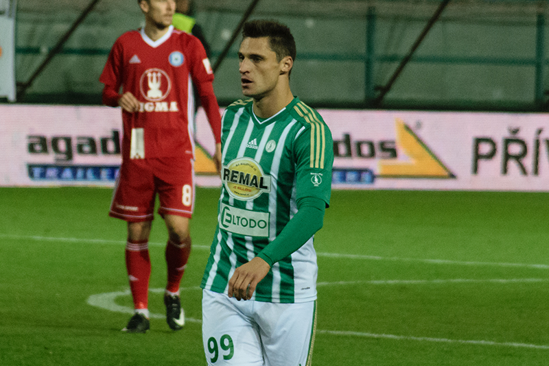 Evgeni Kabaev